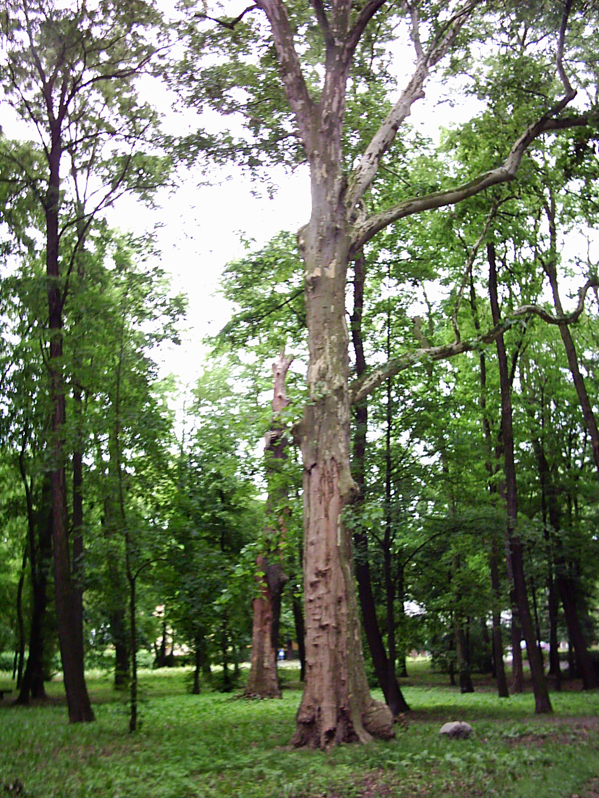 Platan w Parku Leśnym w Głogowie